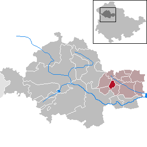 Tottleben in Thuringia - Unstrut-Hainich-Kreis